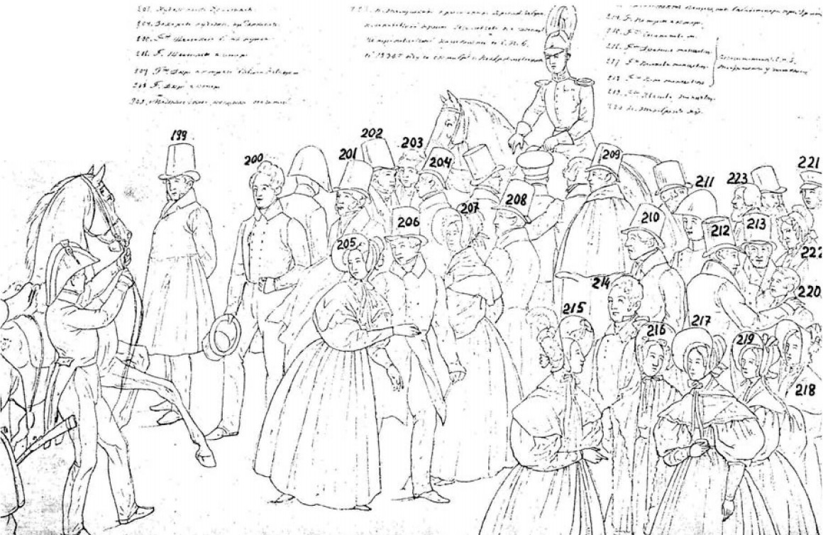 Прорись фрагмента картины с указанием номеров персонажей в списке портретированных зрителей